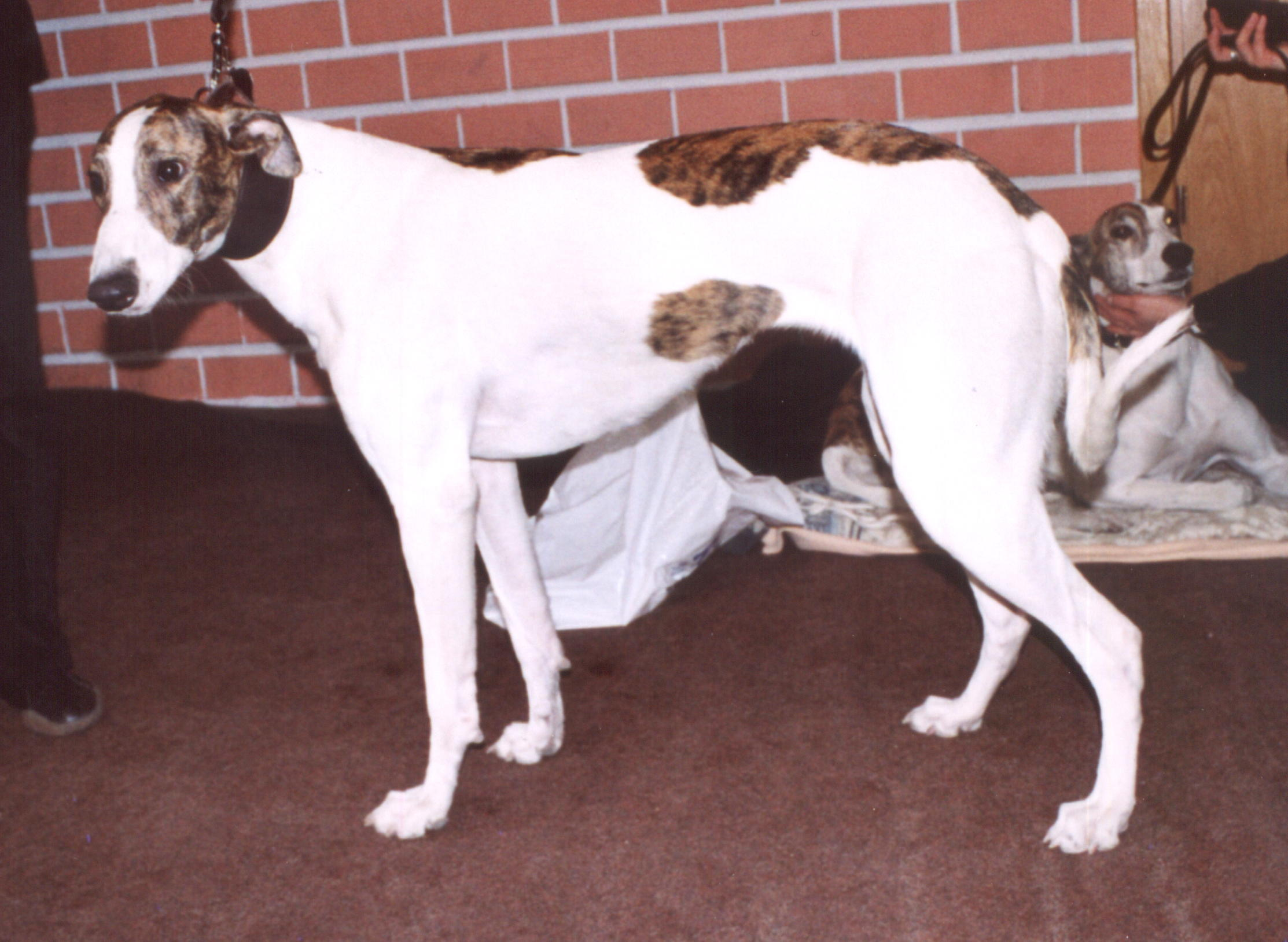 Chart węgierski - na wystawie psów w Katowicach (2005)